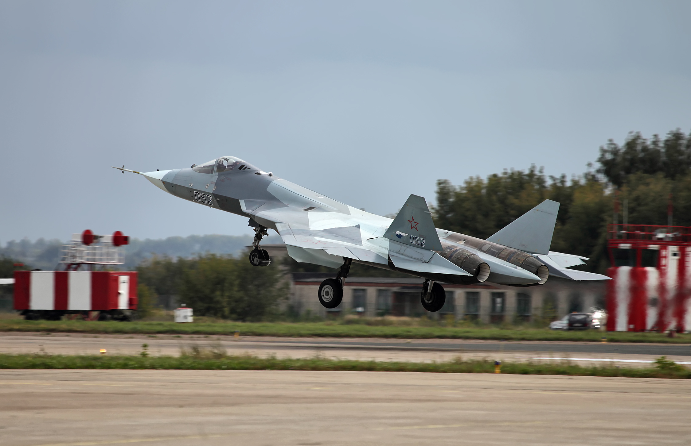 Т-50 ПАК ФА (T-50 PAK FA)